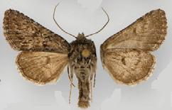 Lasionycta benjamini medaminosa male